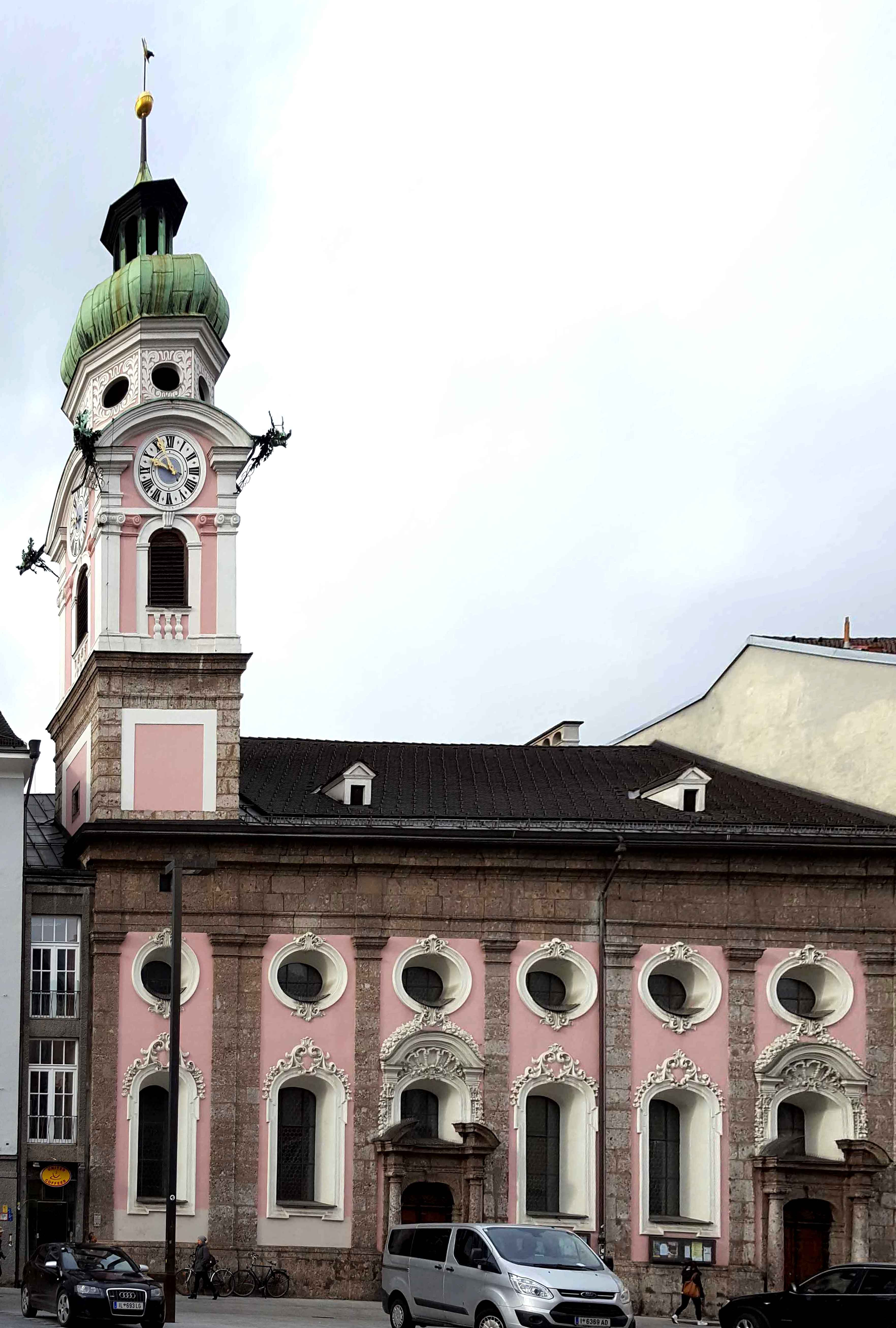 Kirche von aussen frontal